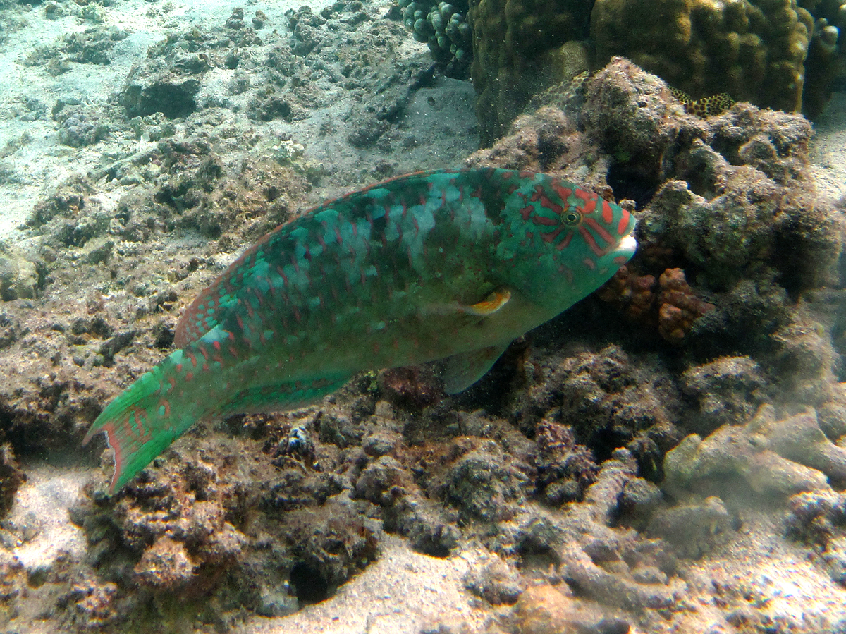 Un poisson-perroquet des carolines (Calotomus carolinus) mâle à la Réunion.